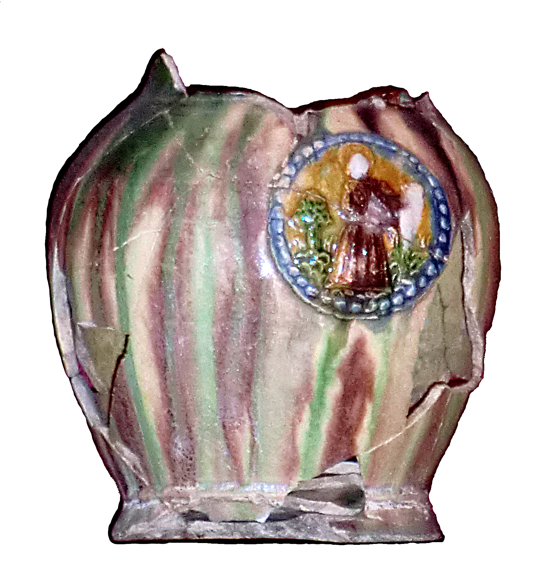 Krug aus Gschaid mit Heiligem